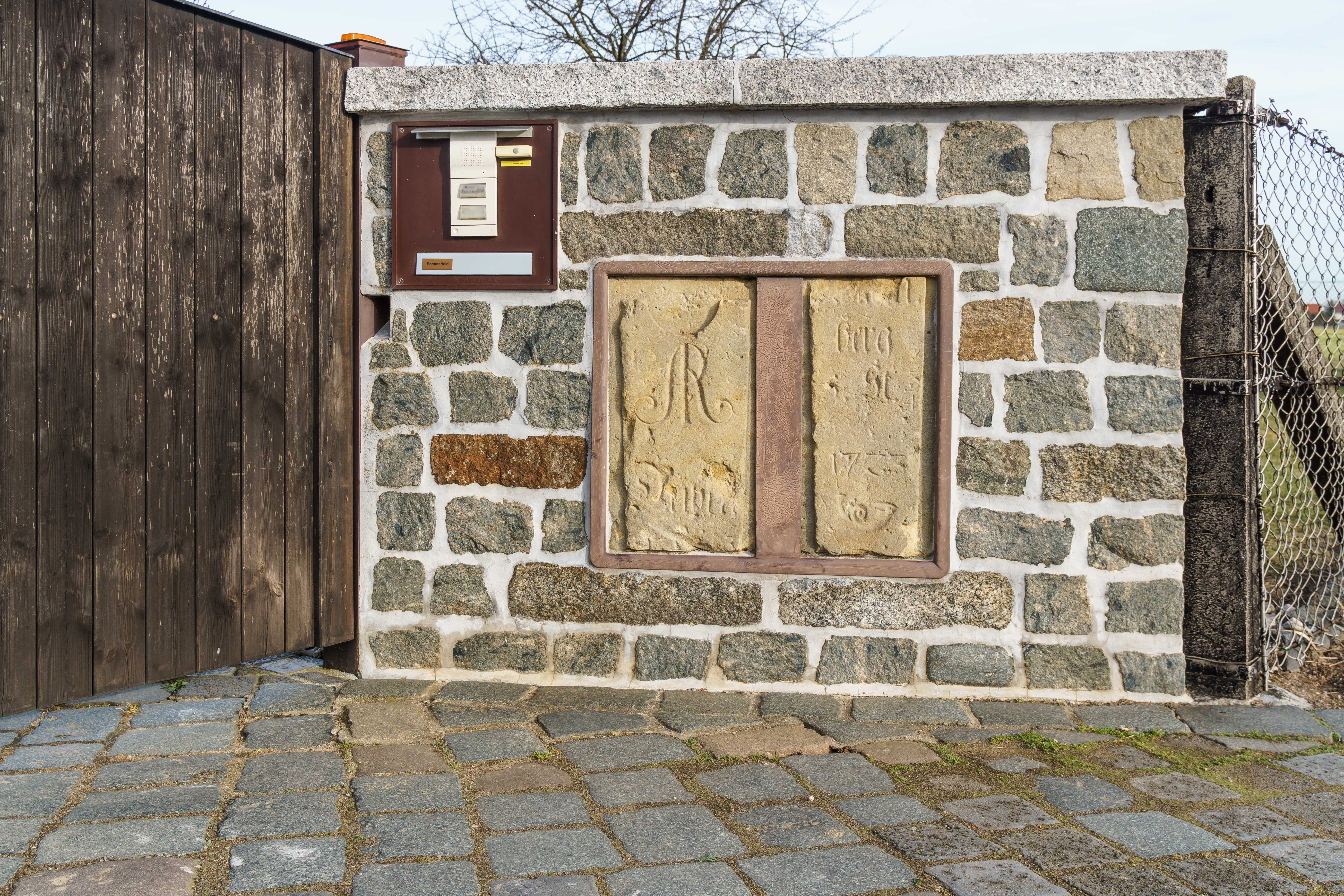 Zwei Reststücke des Original-Schaftteils der kursächsischen Halbmeilensäule Nr. 18 von Eisenhammer bei Tornau. Eingebaut in der Grundstücksmauer neben dem Einfahrtstor zur Mühle Sommerfeld in Tiefensee. Text: AR ; Düben ; berg . St ; 1723 ; Posthorn